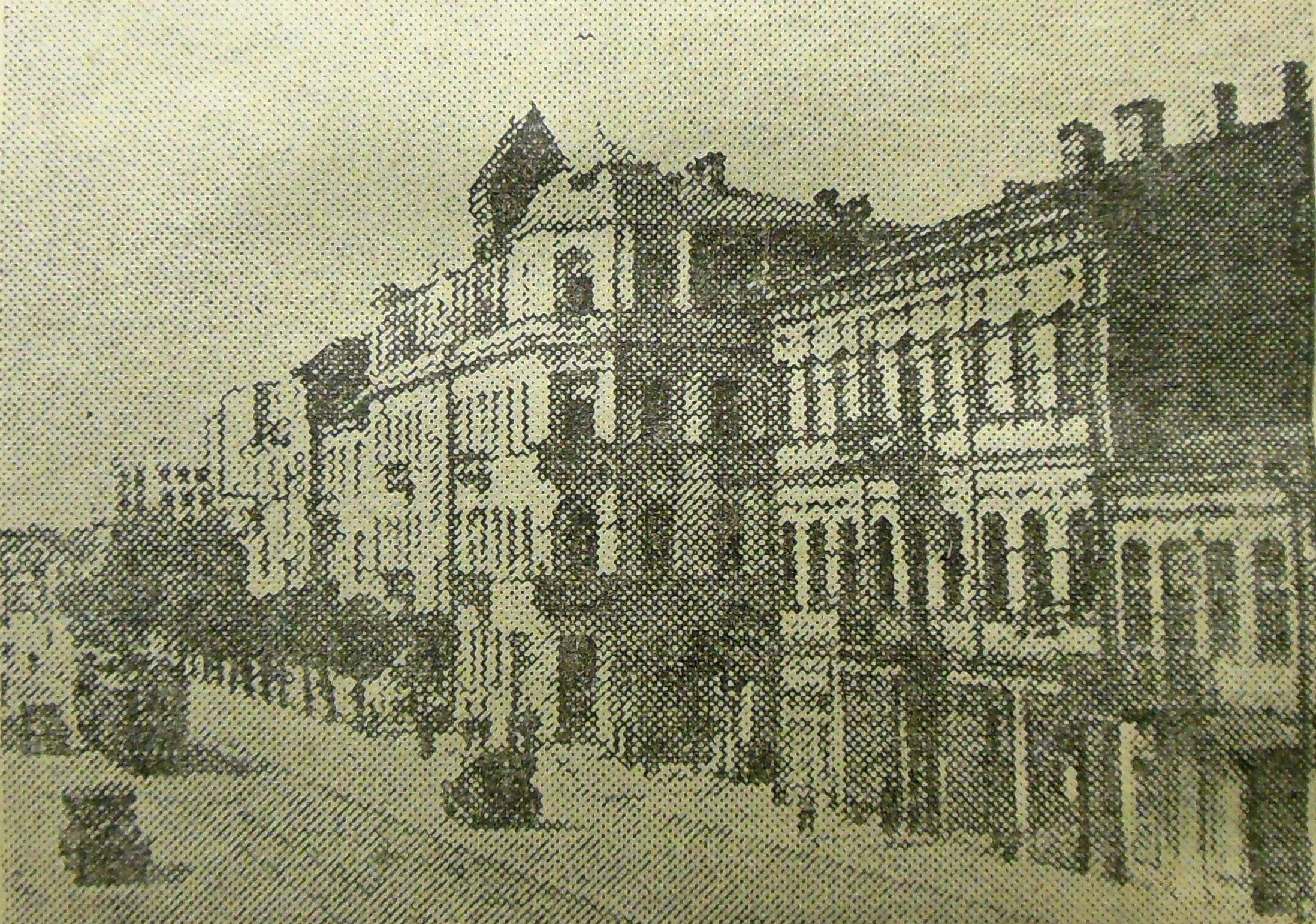 Беларуская (тарашкевіца): Менск (Miensk), вуліца Захараўская (vulica Zacharaŭskaja) каля скрыжаваньня з Ігуменскай (vulica Ihumienskaja). Сучасны пляц Незалежнасьці (plac Niezaležnaści)